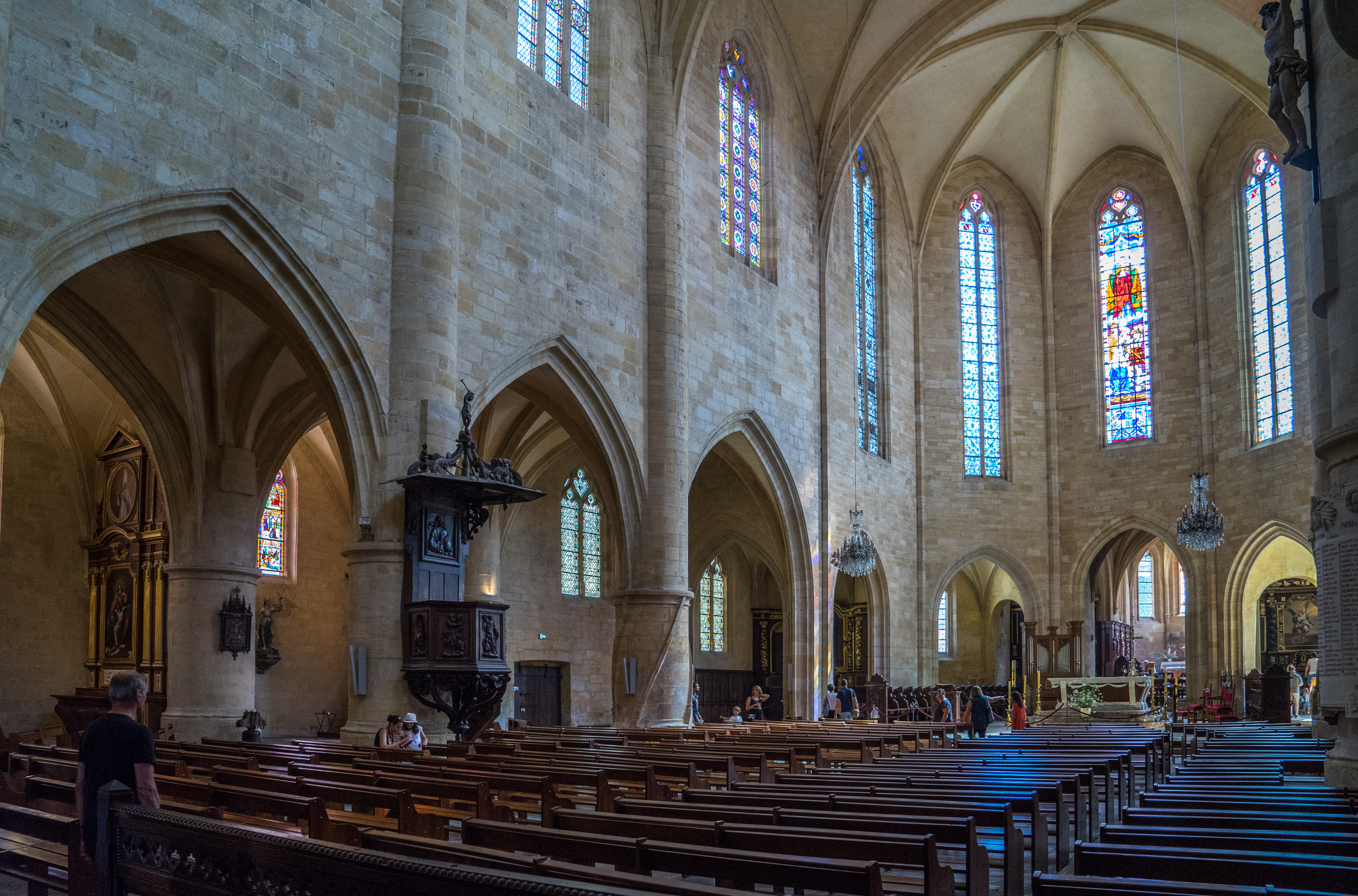 Sarlat - Cathédrale_Saint-Sacerdos - Nef